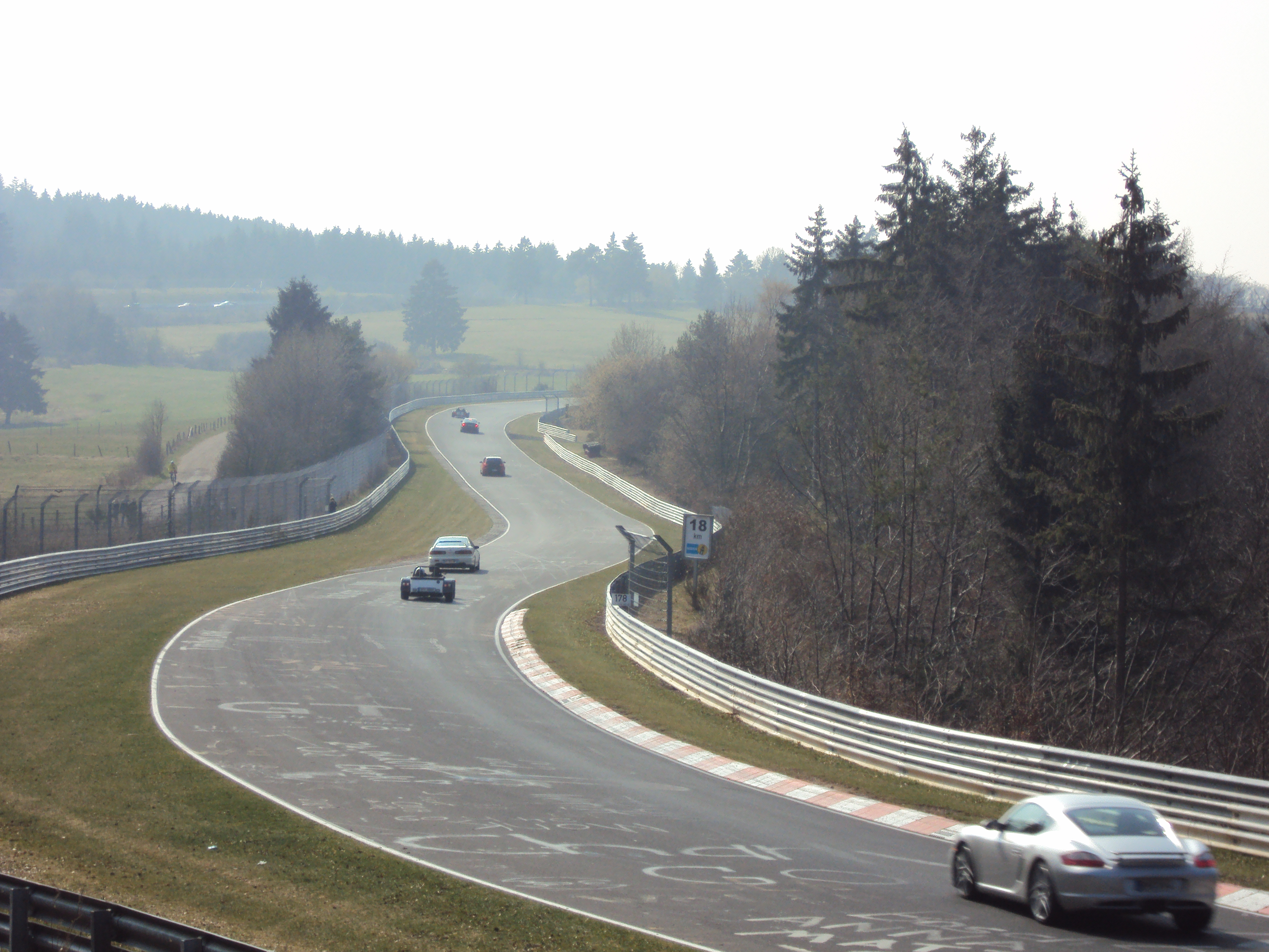 Streckenabschnitt Pflanzgarten II der Nürburgring-Nordschleife.